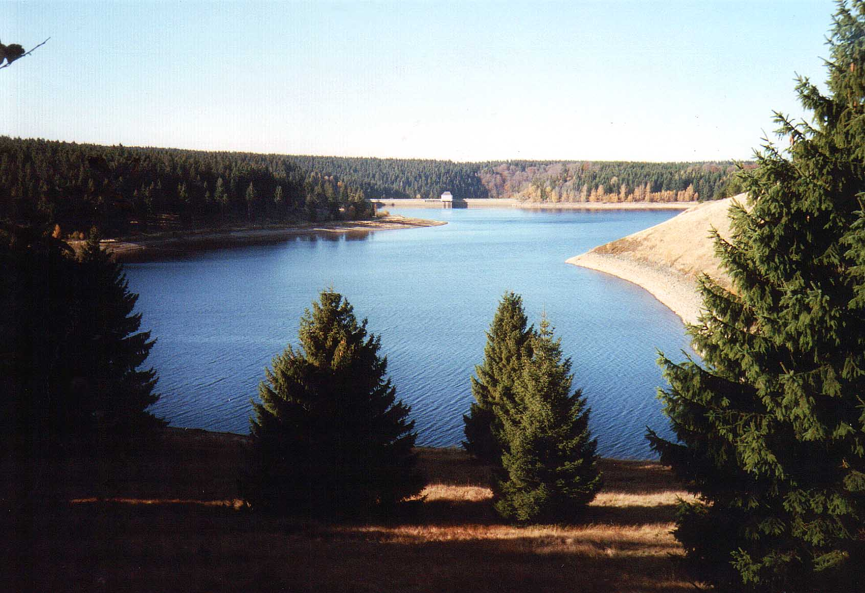 Eckertalsperre